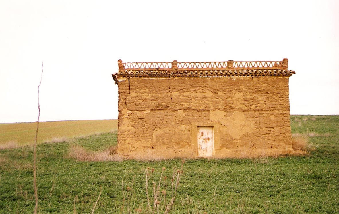 Palomar típico de Tierra de Campos en San Román de la Cuba